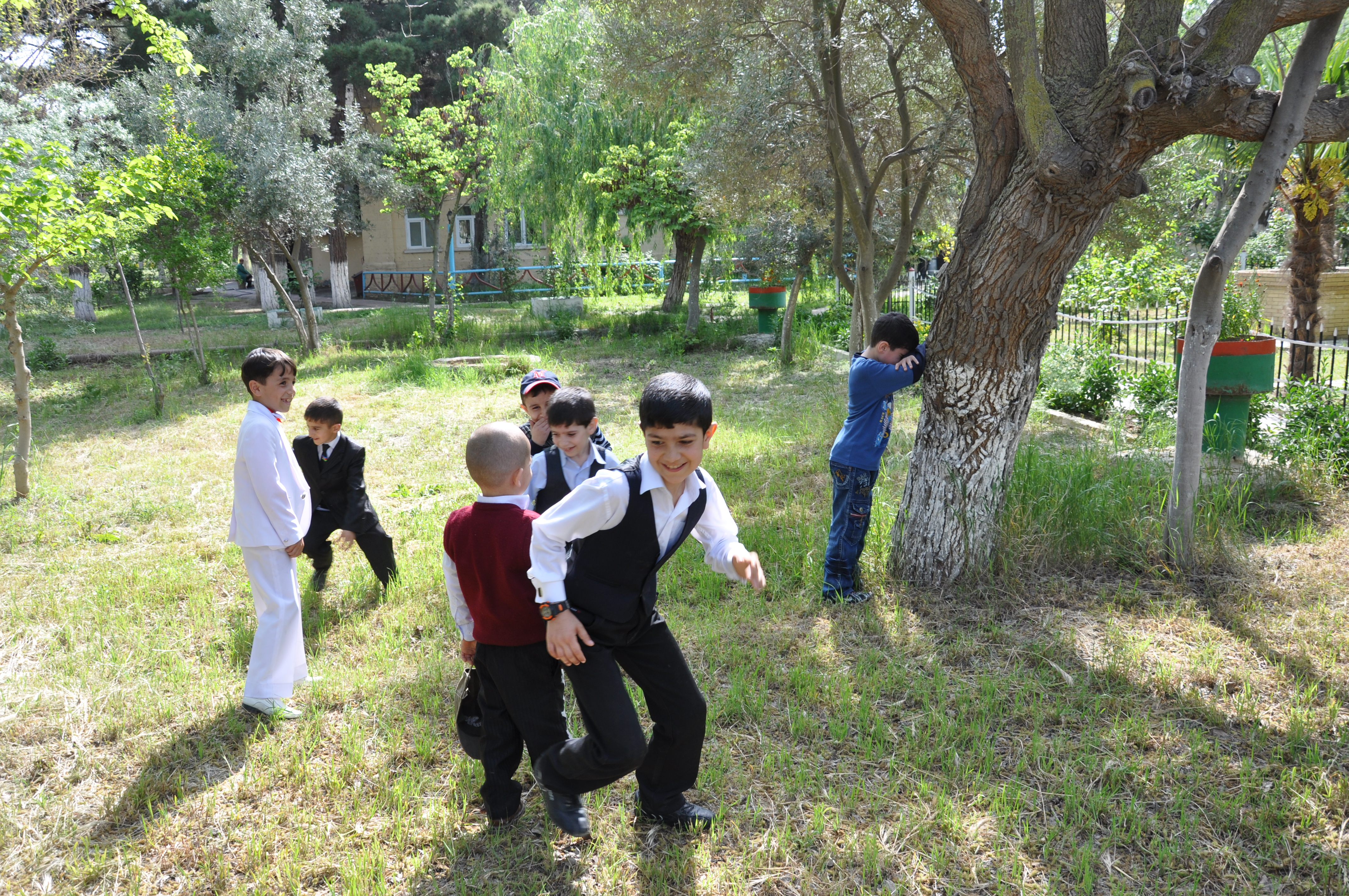 Gizlən qaç - Azərbaycanda ən çox yazqabağı (bayramqabağı) günlərdə, eləcə də digər mövsümlərdə əsasən uşaq və gənclər arasında, geniş şəkildə oynanılan qədim oyunlarından biridir.